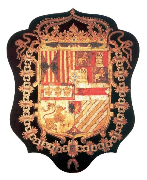 Escudo de armas de la Real Audiencia de Santa Fe, 1550 (Museo Nacional de Colombia) HISTORIA - OBJETOS TESTIMONIALES Autor: Anónimo Titulo: Escudo de armas de la Real Audiencia de Santa Fe Fecha: Ca. 1550 Técnica: Cosido y bordado a mano (Hilos/Tela) No. Registro: 97 Museo Nacional de Colombia